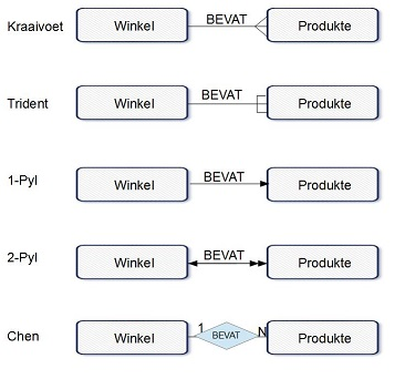 Erkende notasies vir Entiteit-relasie datamodellering